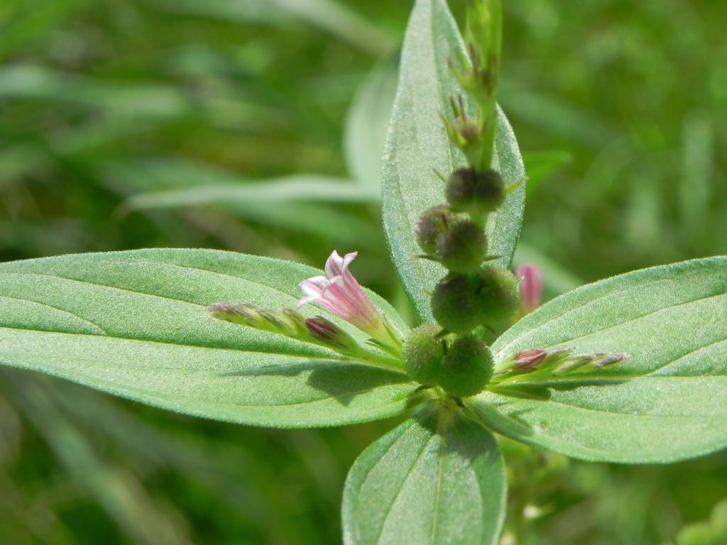 Spigelia anthelmia L. - LOGANIACEAE - Parque Olhos D'Água - Brasília - Distrito Federal - Brasil.